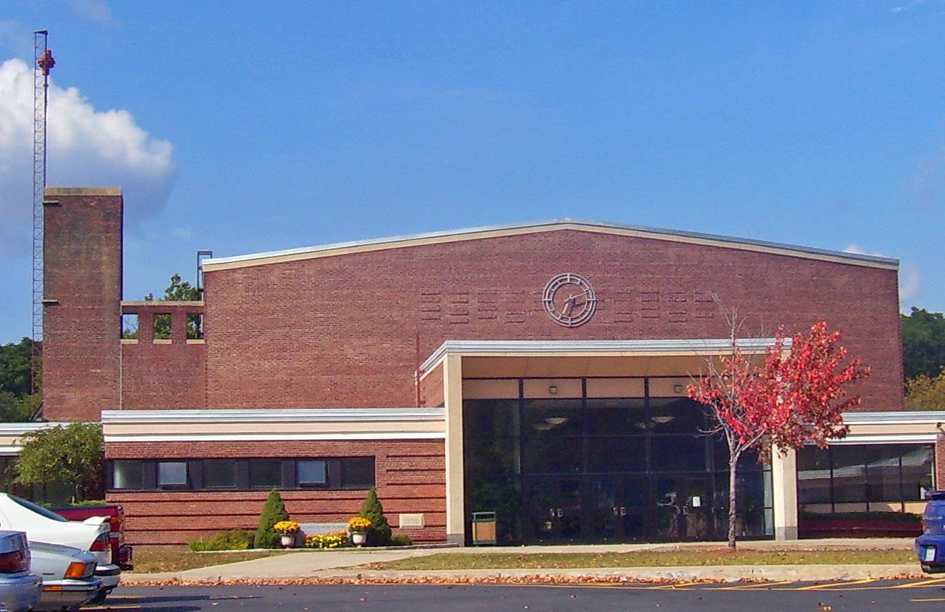 Ellenville High School in Ellenville, NY, USA